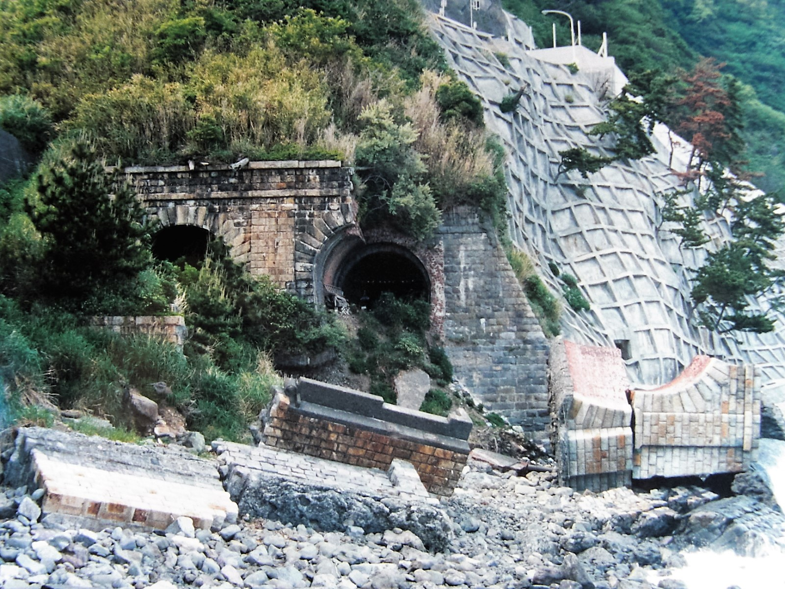 東海道線旧石部隧道神戸方坑門